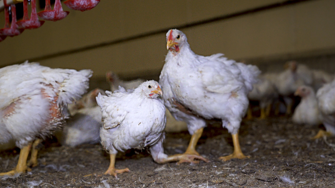 Poulet d'élevage intensif